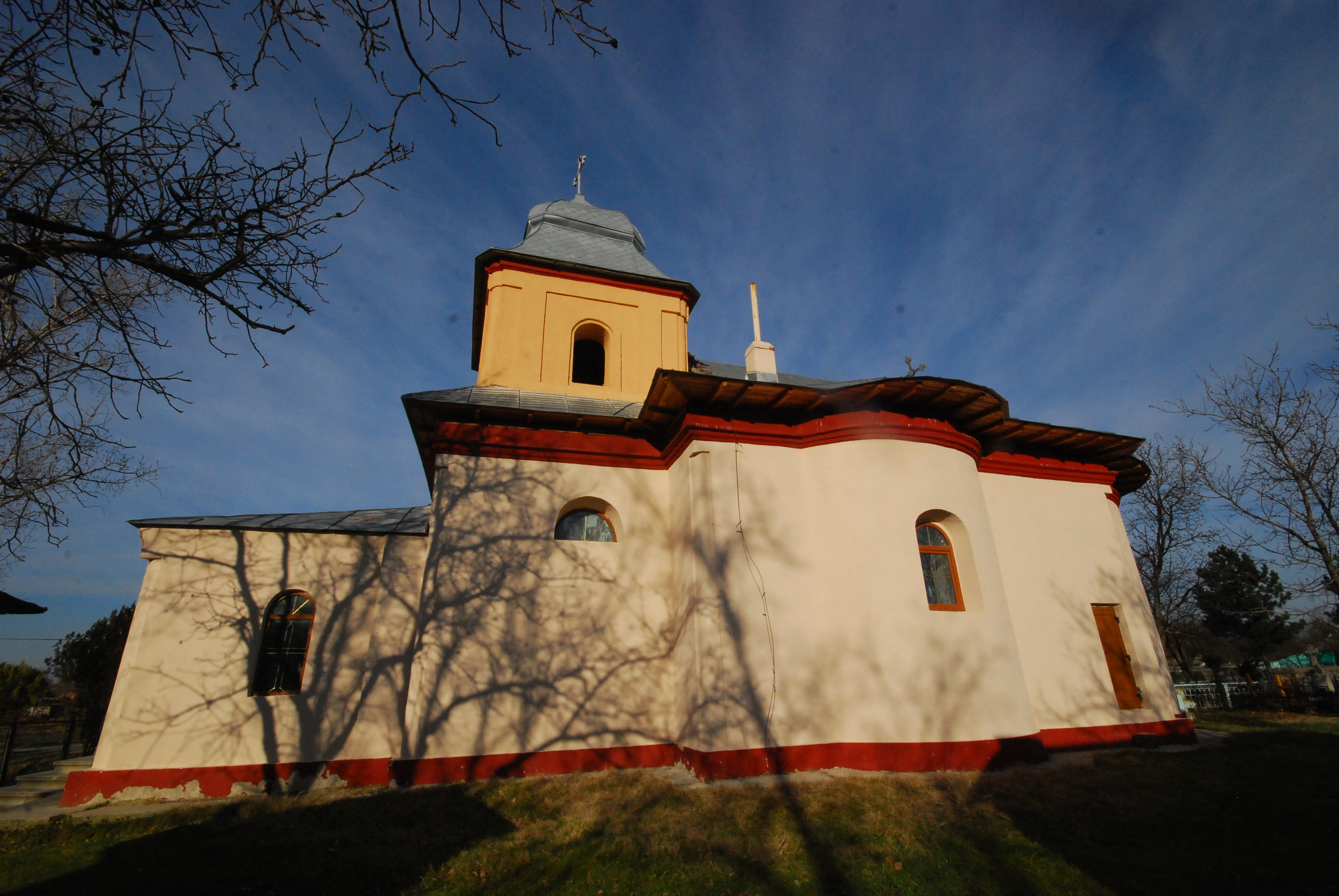 Biserica "Sf. Nicolae"